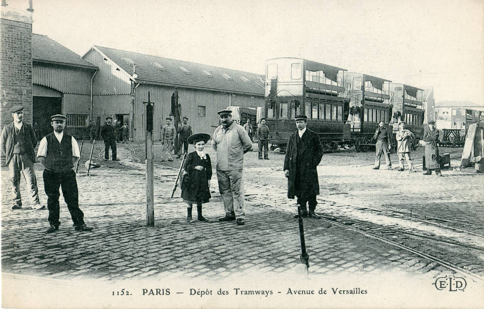 Carte postale ancienne édidée par ELD, N°1152PARIS : Dépôt des Tramways - Avenue de VersaillesIl semble encore s'agir d'un dépôt hippomobile